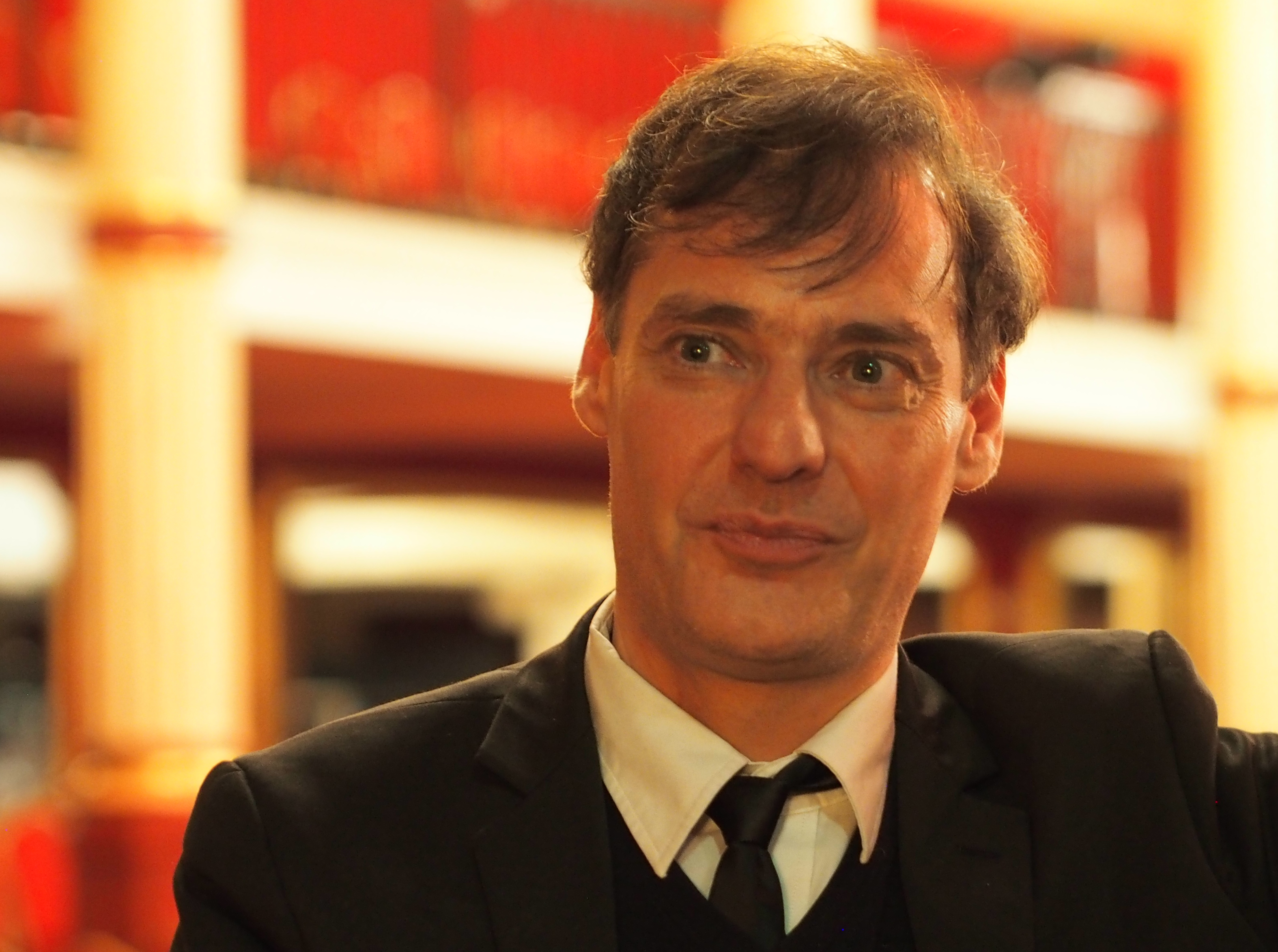 Régis Campo, compositeur français - Salle Wagram, à Paris, le 24 novembre 2019.